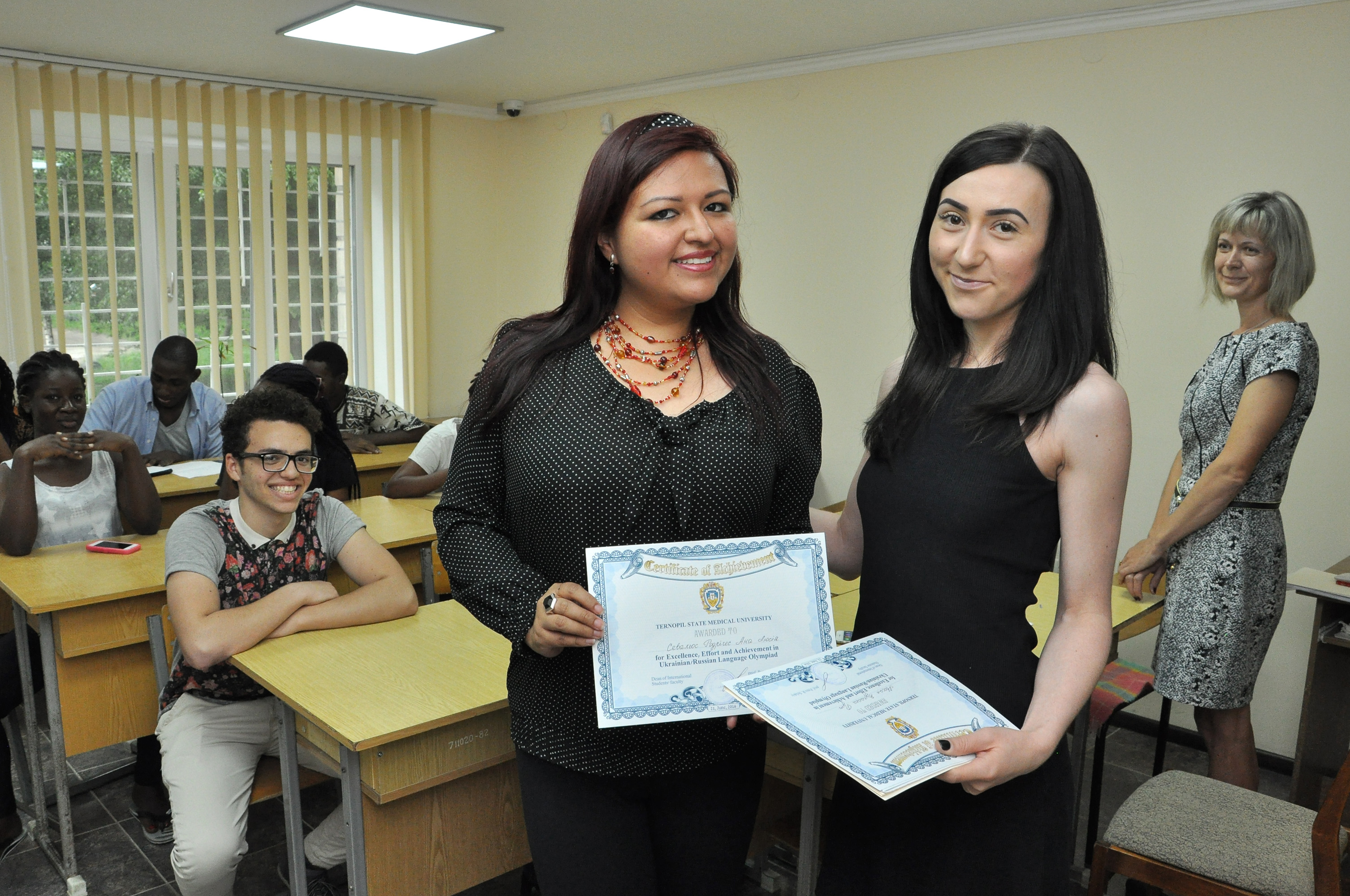 Вручення дипломів слухачам підготовчого відділення для іноземців та осіб без громадянства Тернопільського державного медичного університету імені І. Я. Горбачевського. Диплом Севальос Родрігес Ана Люсія вручає Марина Тимощук.